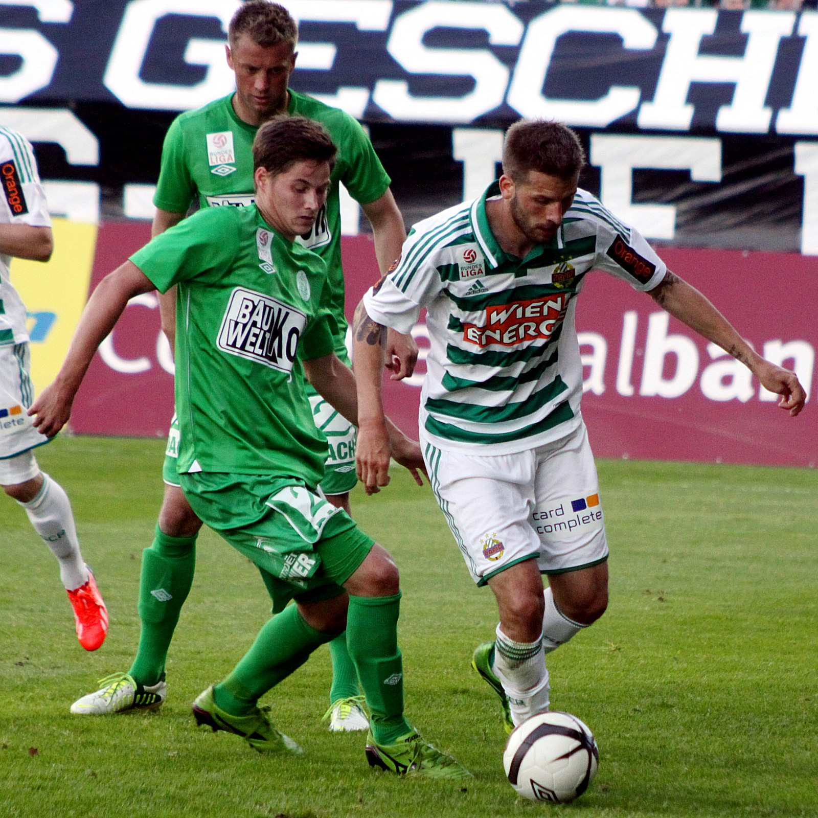 Meisterschaftsspiel der österreichischen Bundesliga: SV Mattersburg gegen SK Rapid Wien am 18. Mail 2013 (2:0)] im Mattersburger Pappelstadion. - Das Foto zeigt Guido Burgstaller (SK Rapid Wien, rechts) und Thorsten Röcher (SV Mattersburg).